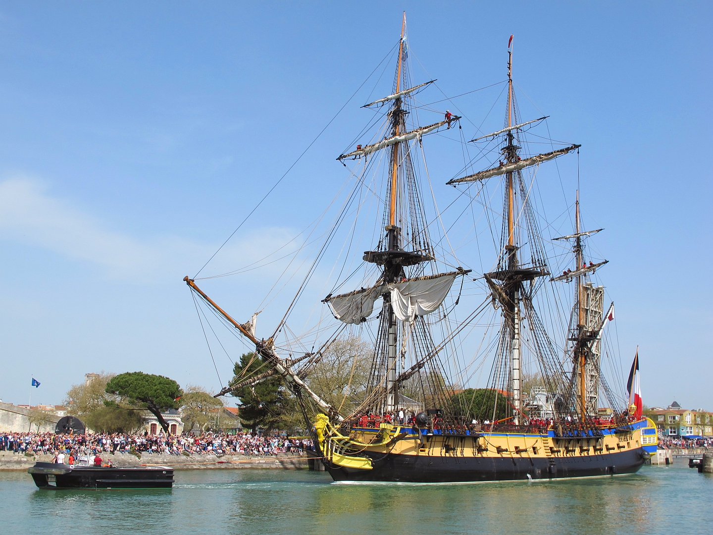 L'Hermione quitte le port de La Rochelle le 15 avril 2015. IMO Number: MMSI Number: 228052600 Call sign: FIQE Length of Hull: 44.20 m Beam: 11.55 m